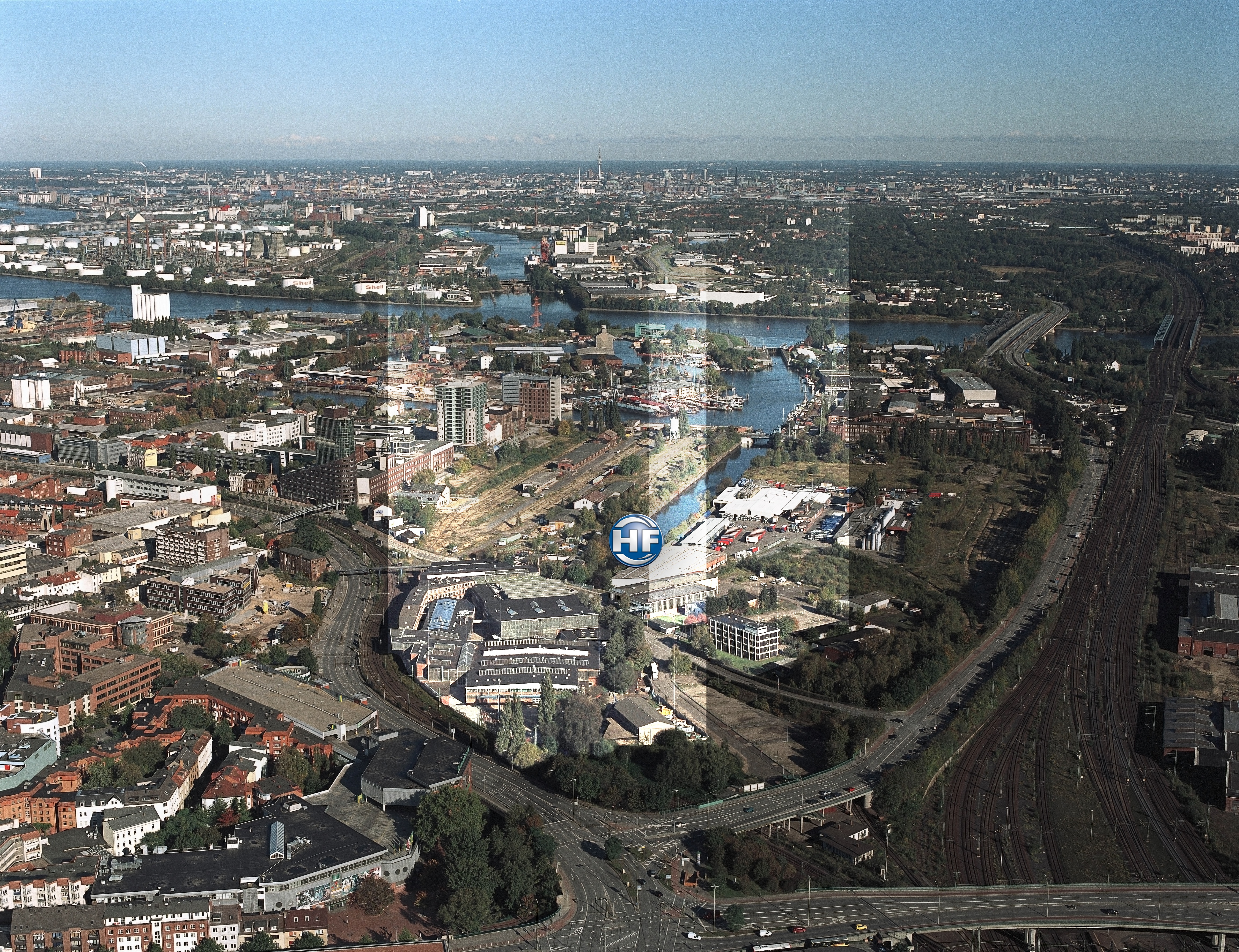 Luftbildaufnahme Werk Hamburg-Harburg